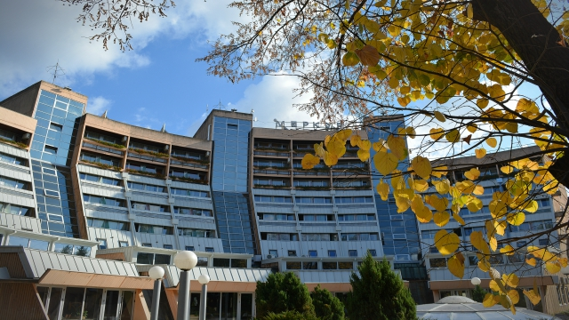 Jesen u Merkuru